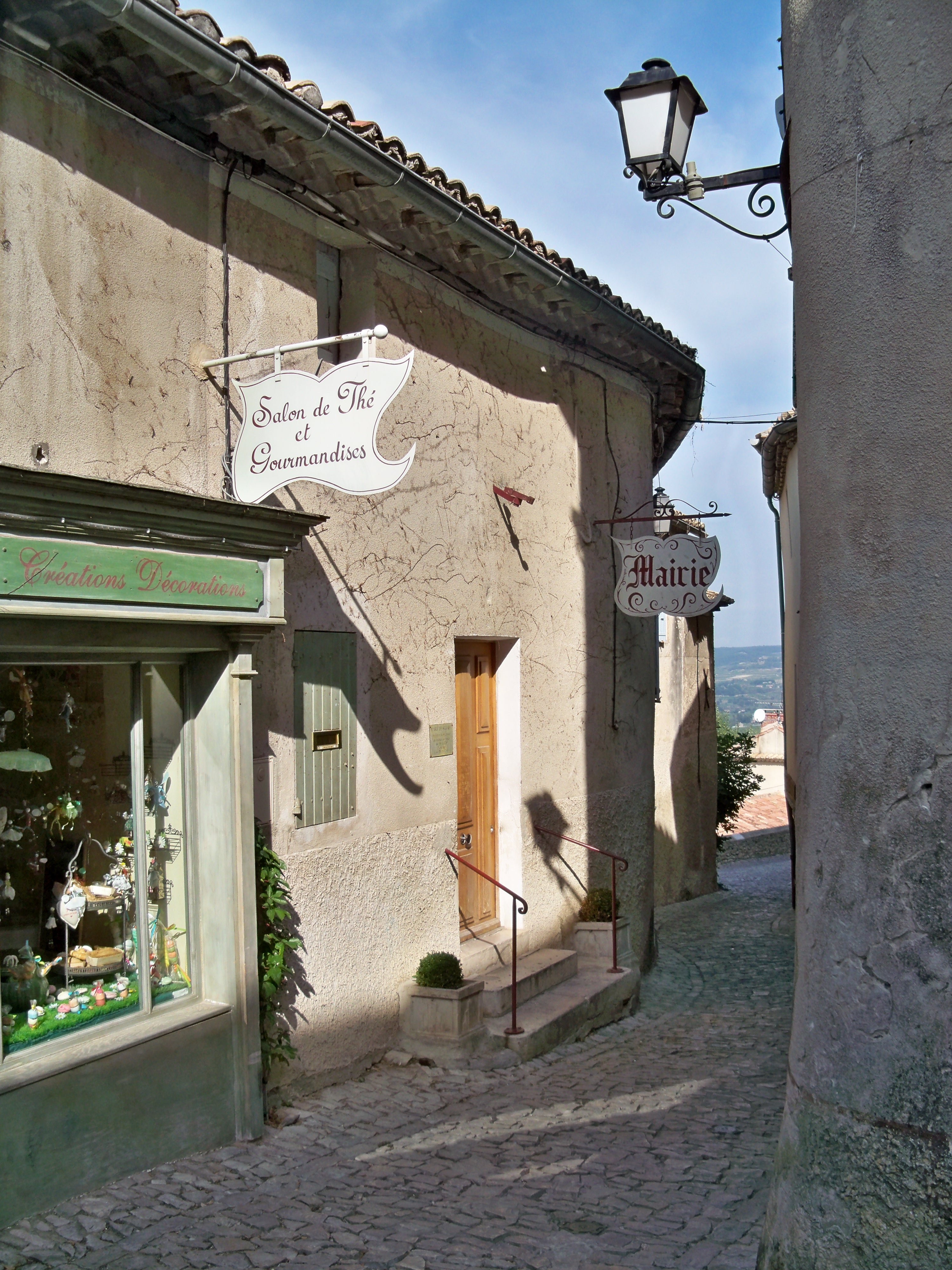 mairie de Séguret (84)